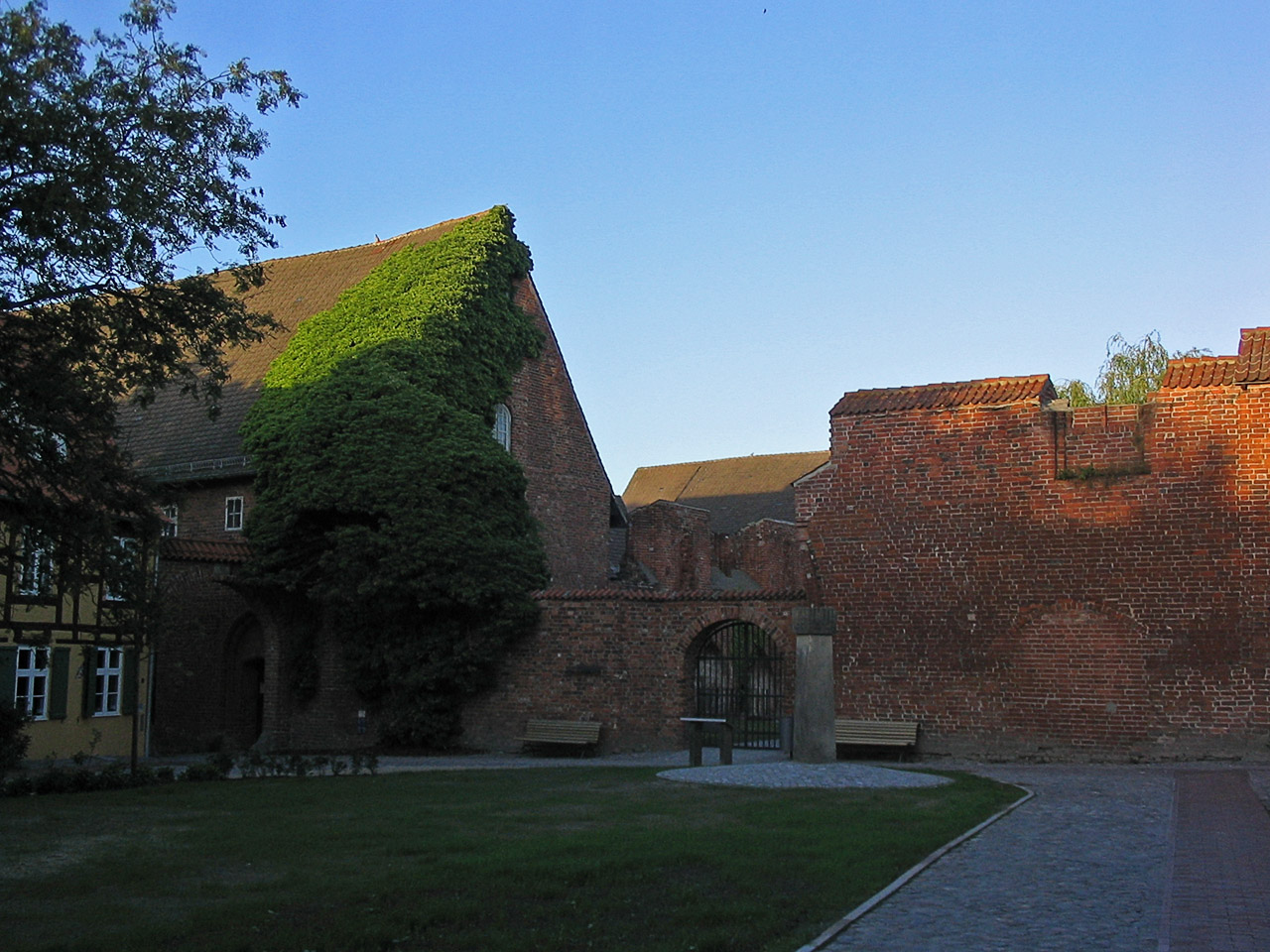 Beschreibung: Innenhof des Johannisklosters in Stralsund Fotograf: Darkone, 28. Juni 2004